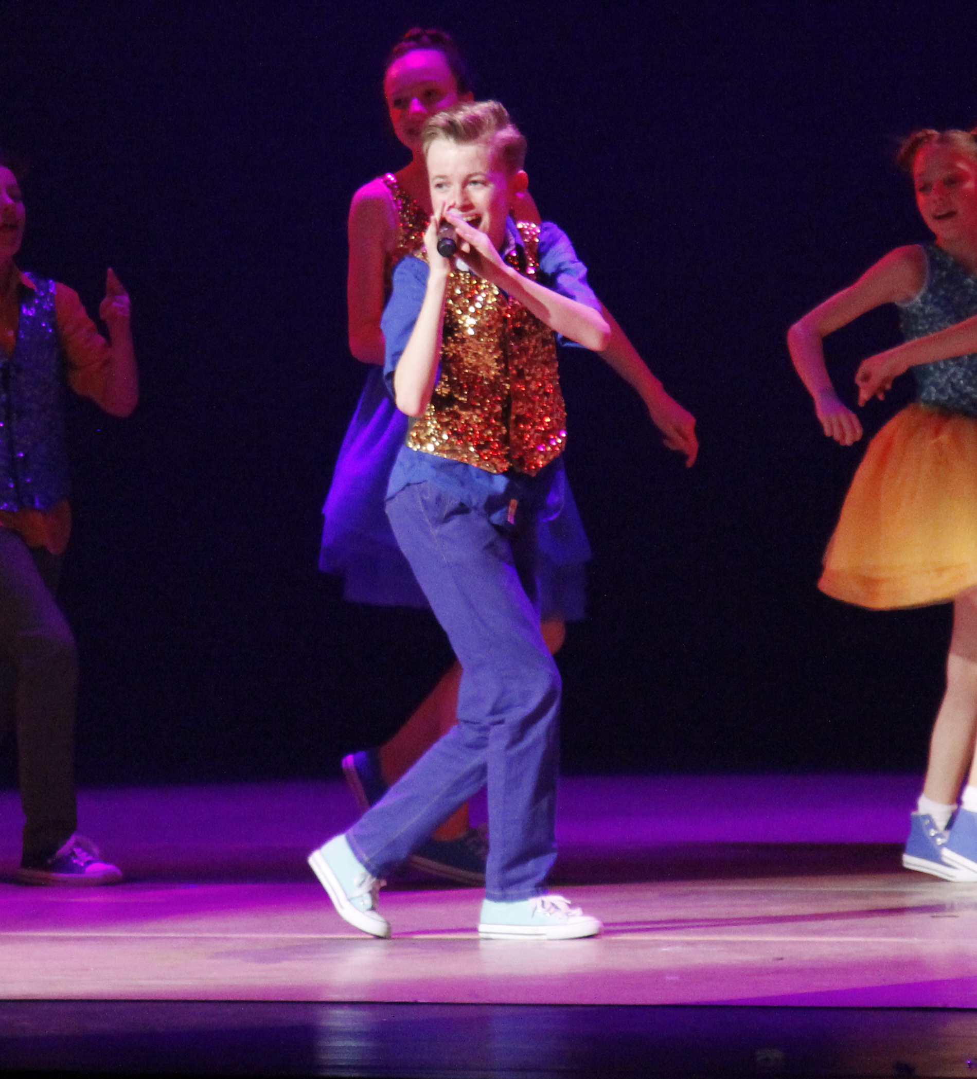 Foto genomen tijdens de Megamix in de musical kadanza together.